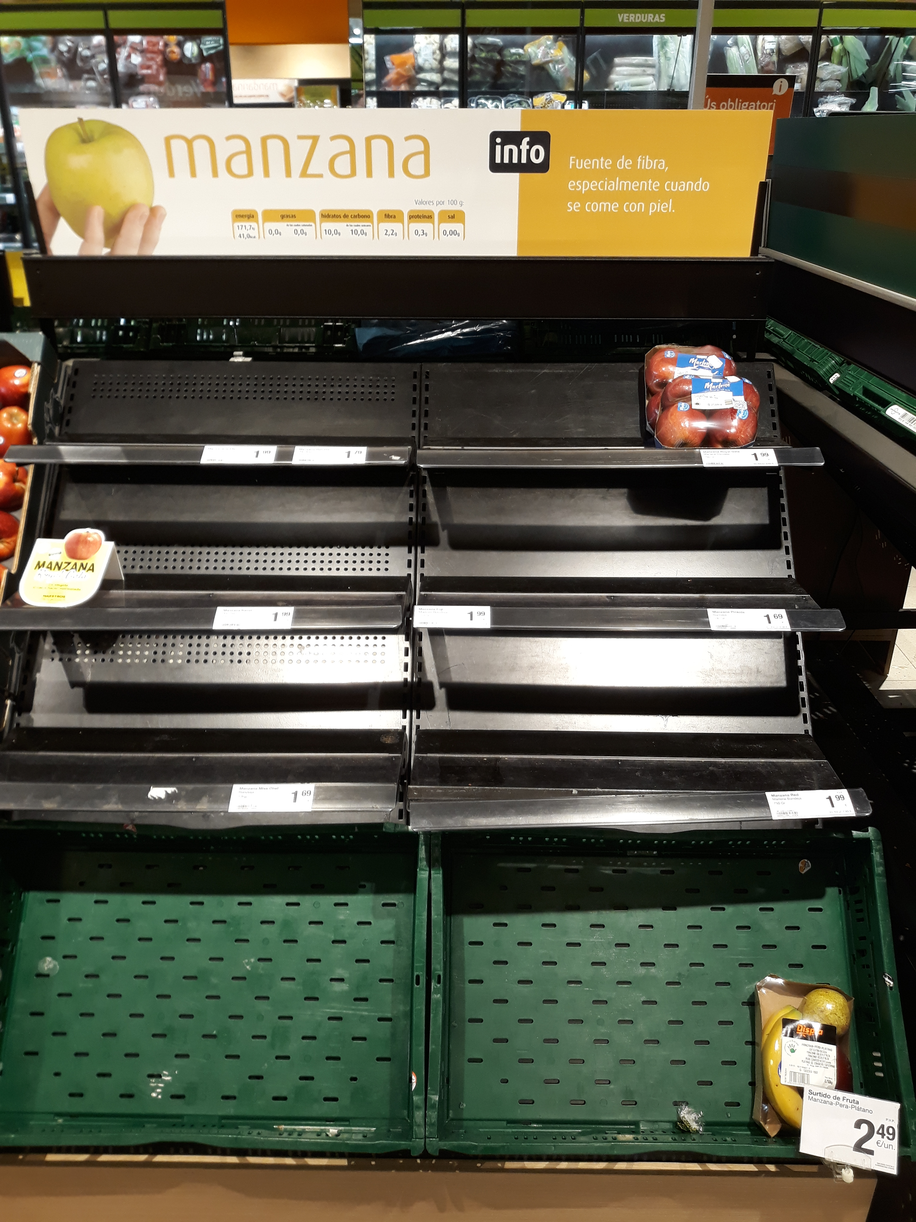 2020-03-14 Desabastiment a Consum Rafelbunyol per compra compulsiva